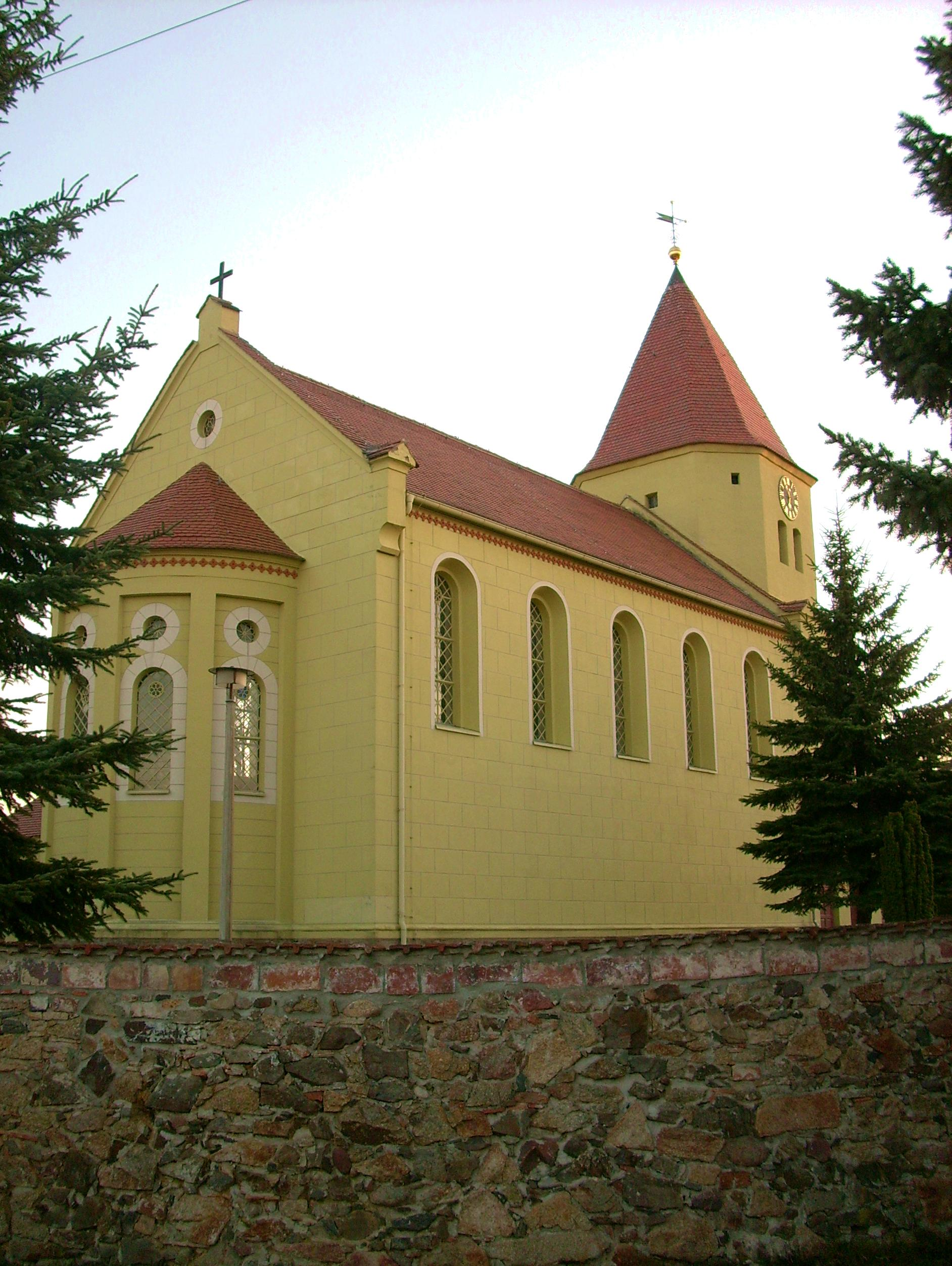 Marienkirche in Schwarzkollm, Ortsteil von Hoyerswerda